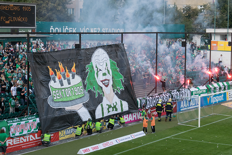 Bohemians Supporter in September 2017.